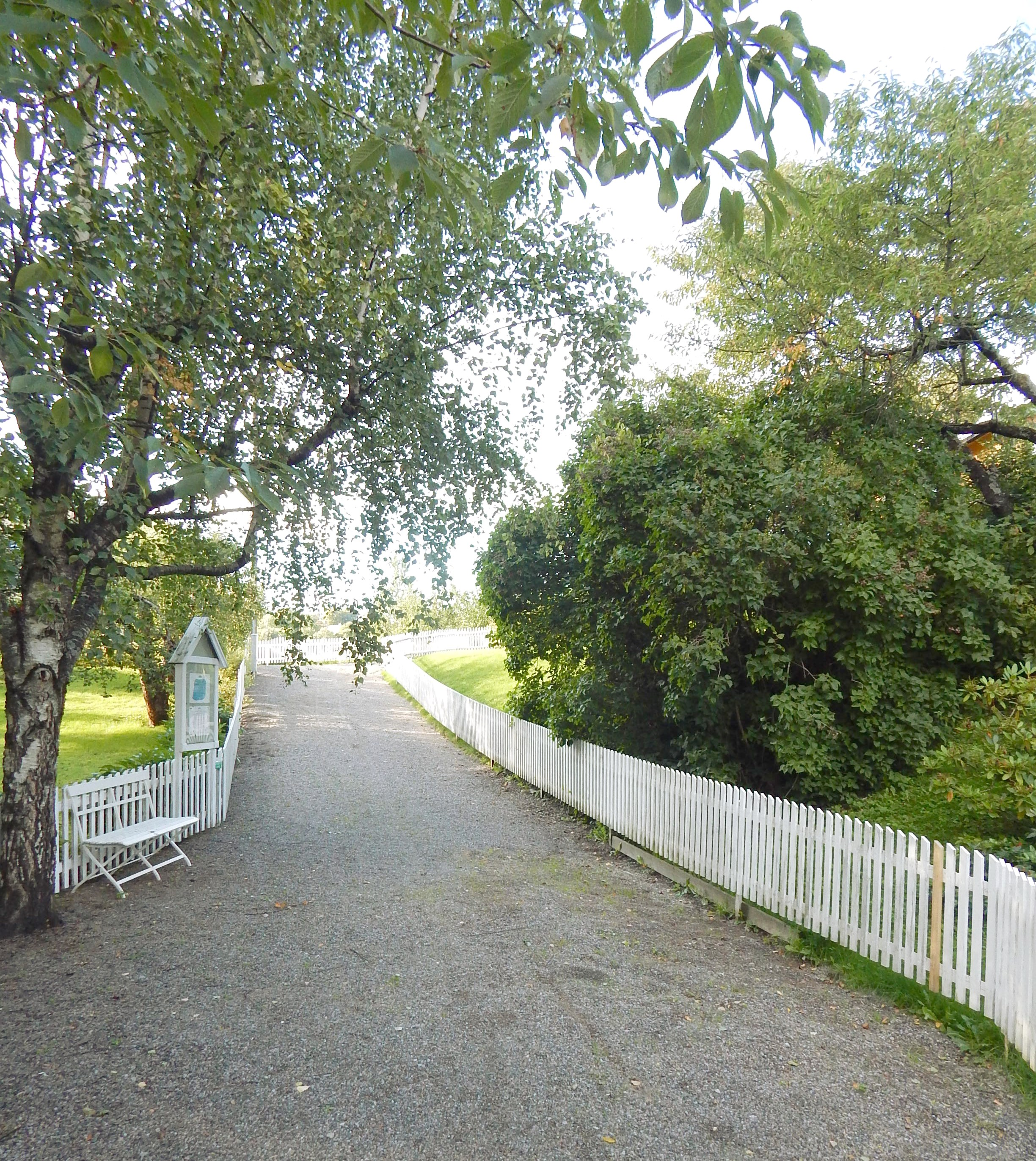 Sogn hagekoloni